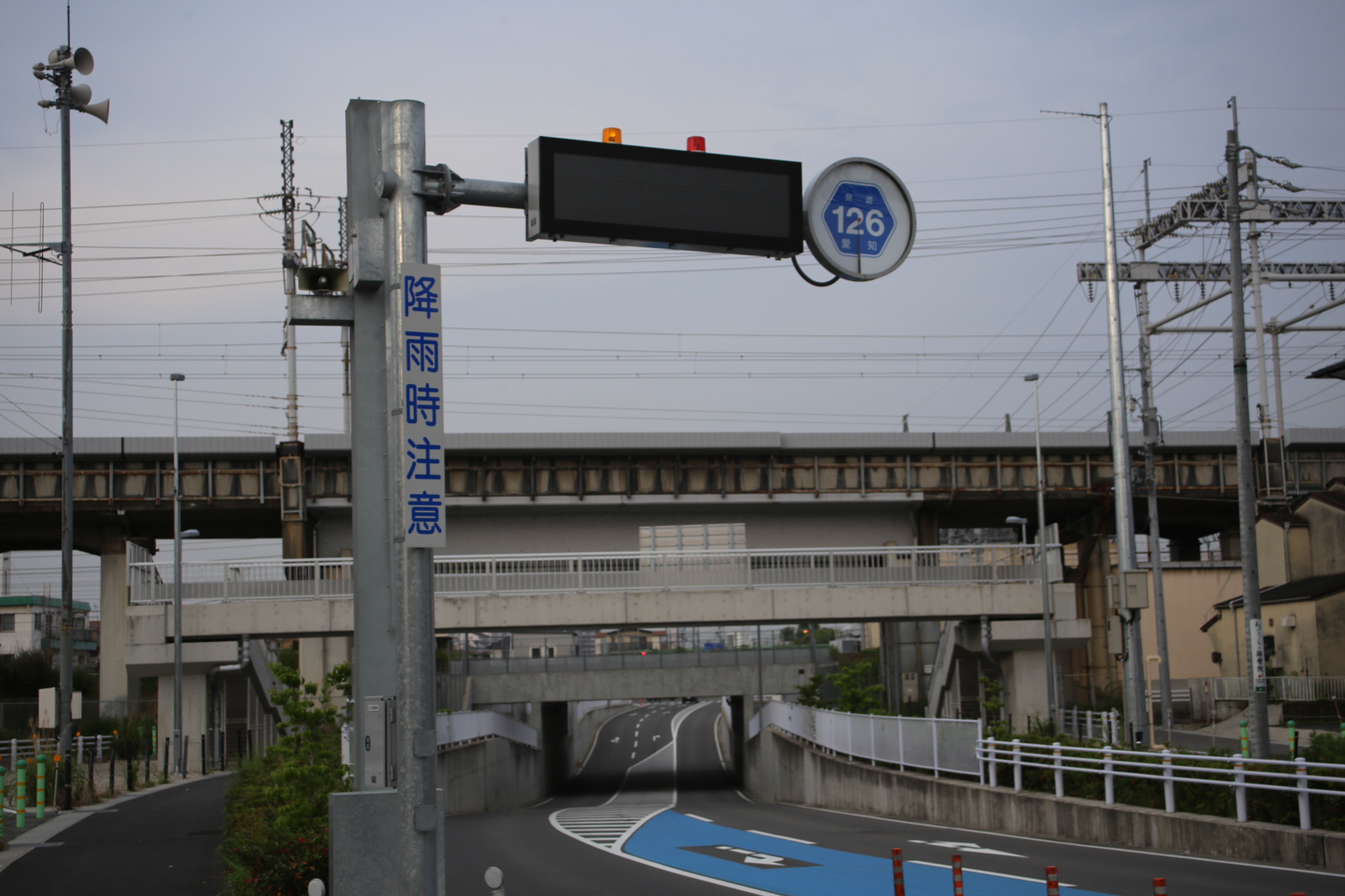 愛知県清須市内の愛知県道126号給父西枇杷島線に設置されている電動による県道番号表示板。奥は東海道線をくぐるアンダーパス。